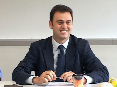 Gonzalo Melián en la UFM